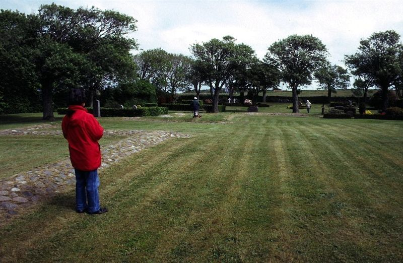 Vestervig Kirke i Danmark. Omrids af Sankt Thøgers kirke